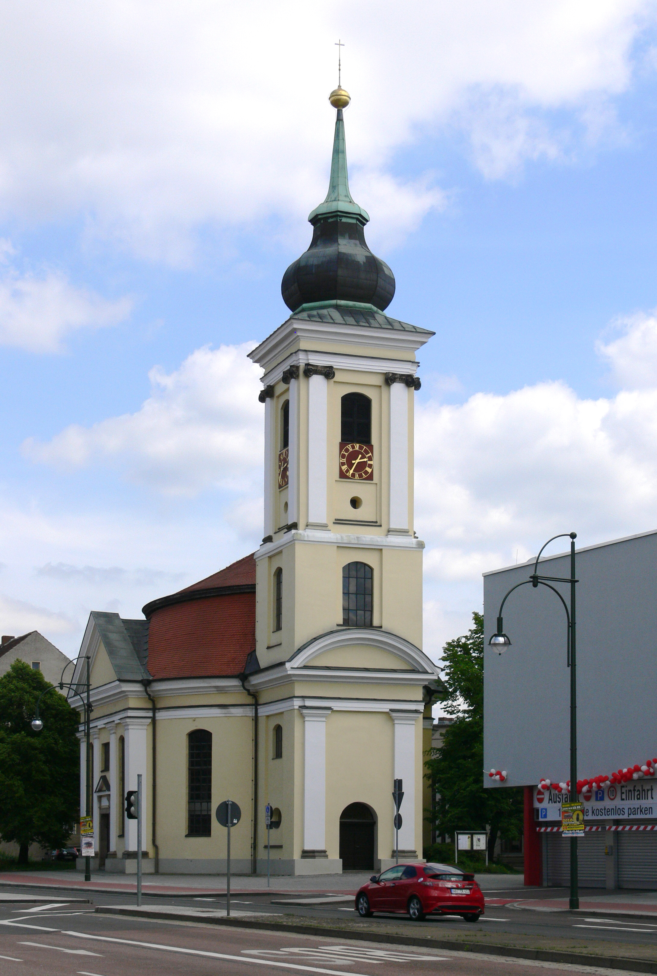 Dessau, Georgenkirche